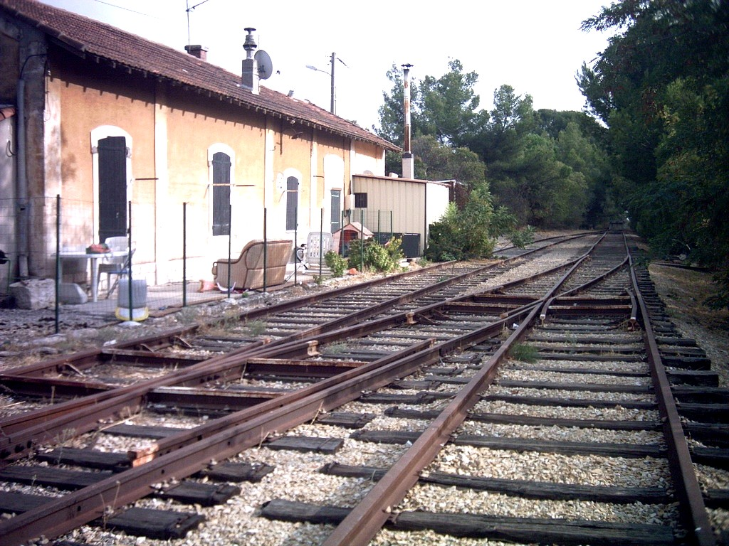 L'ancienne gare "Bouches-du-Rhône" de la Ciotat, contiguë à la gare PLM, aujourd'hui abandonnée.